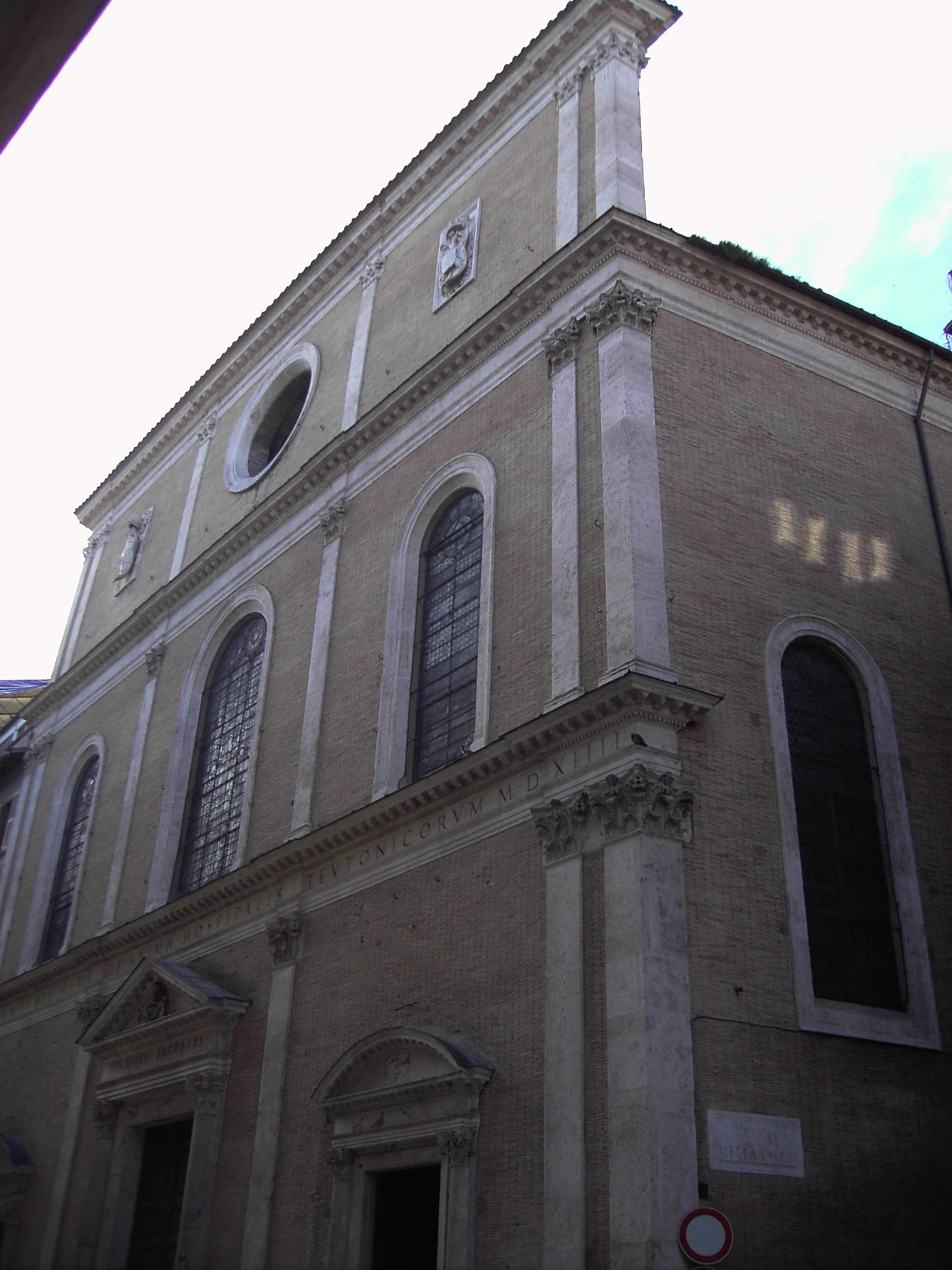 Roma, Santa Maria dell'Anima (Parione)